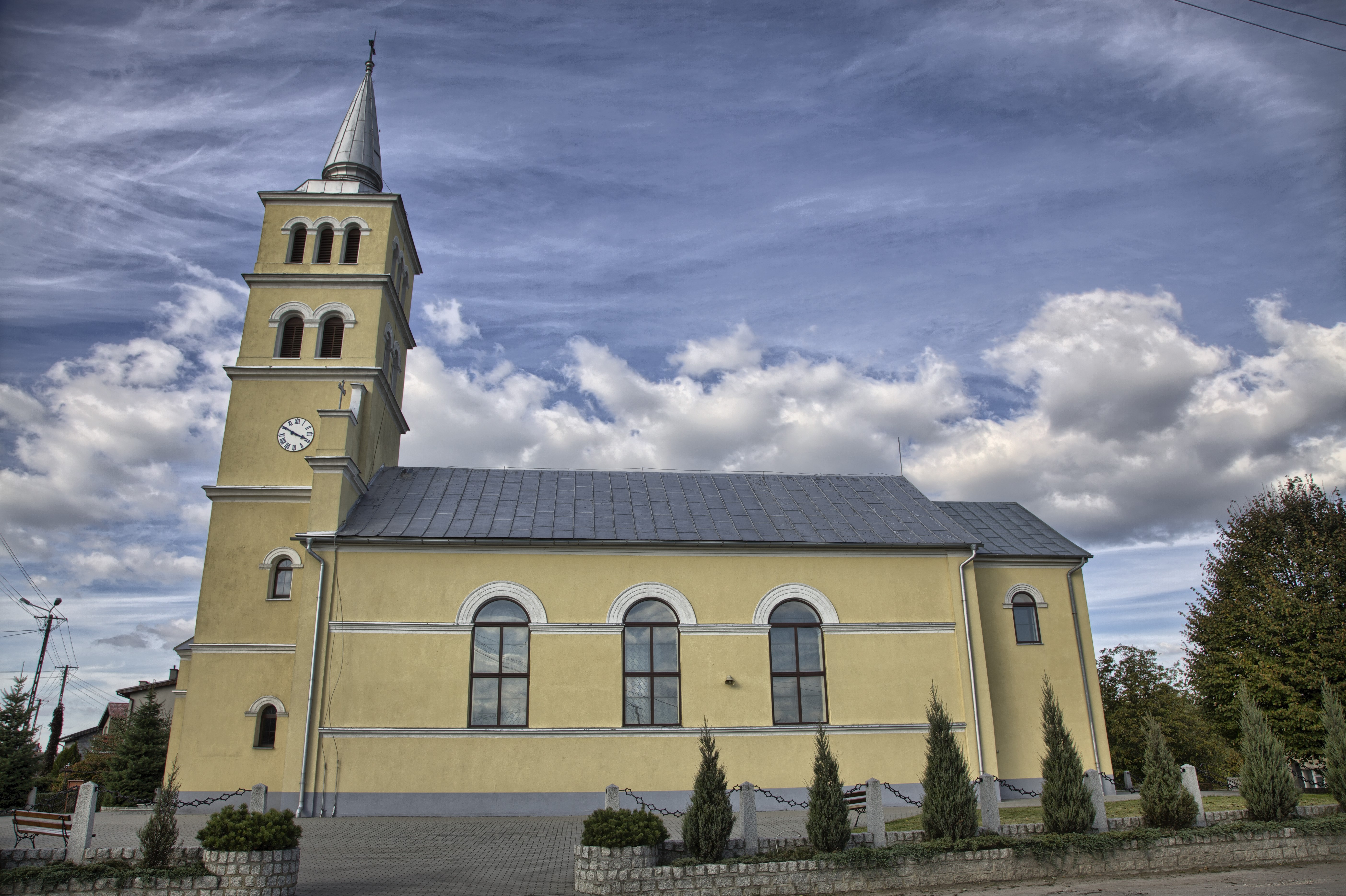 Wyszanów, kościół św. Michała Archanioła, 1842